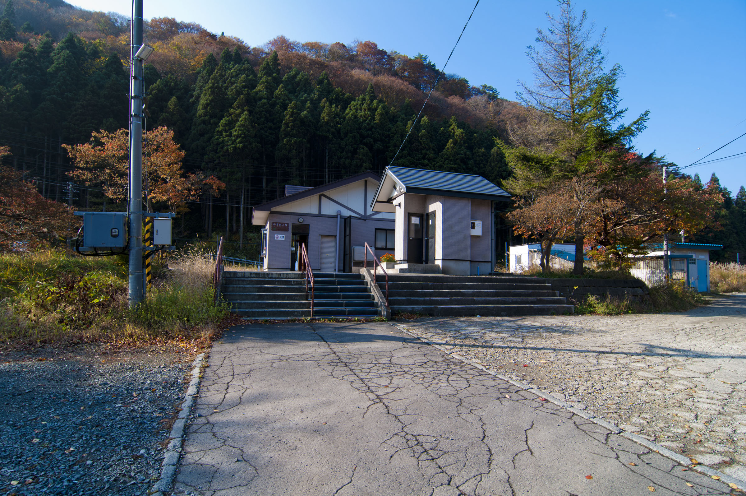 東日本旅客鉄道北上線和賀仙人駅